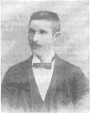 Georgi Konstantonov